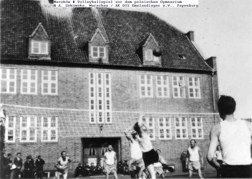 Польская школа в Мачкове. Польская зона оккупации Германии.